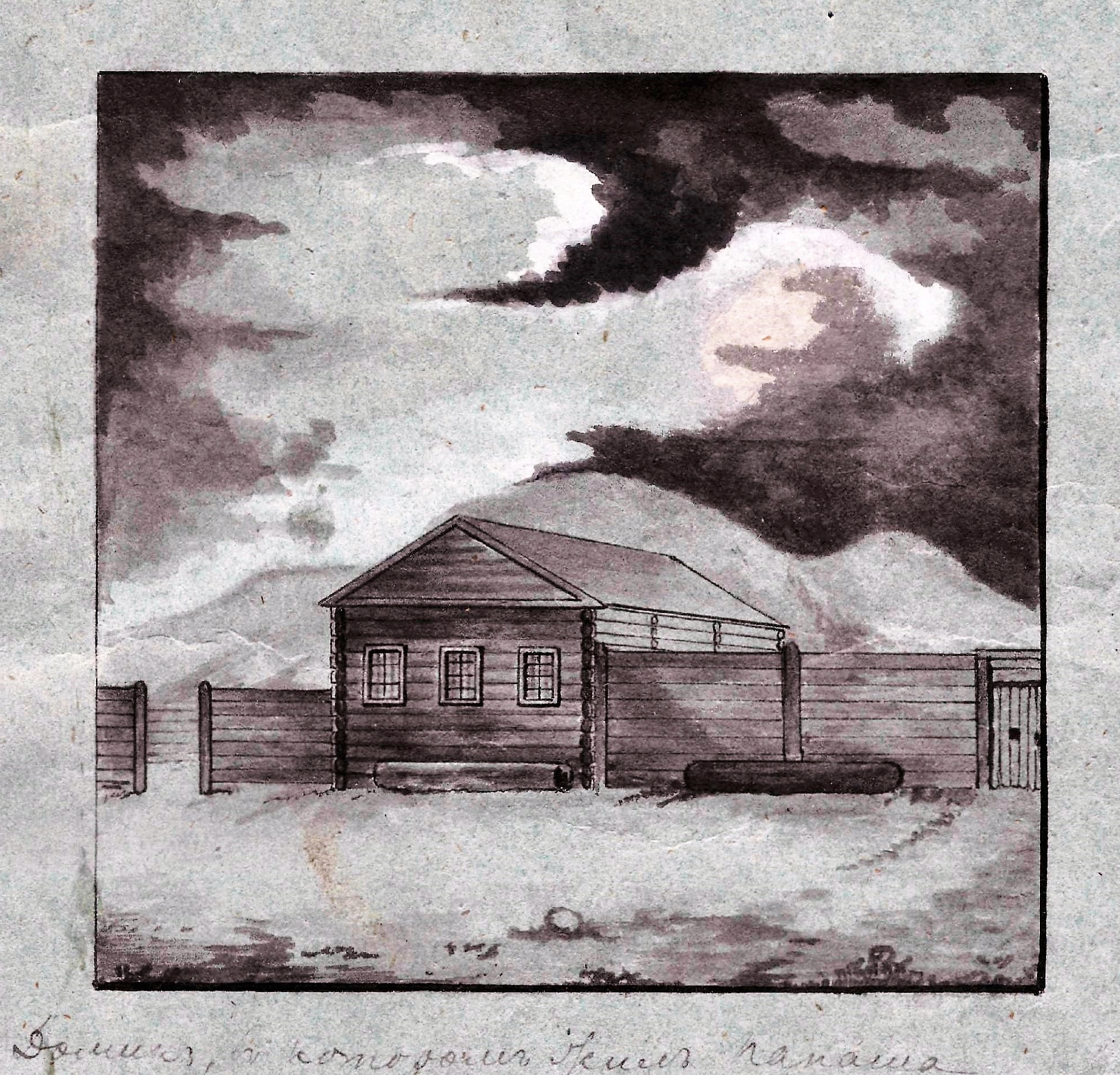 Casa di Černyševskij a Kadaja; illustrazione di autore ignoto, da lui consegnata al figlio di Černyševkij, Michail Nikolaevič.